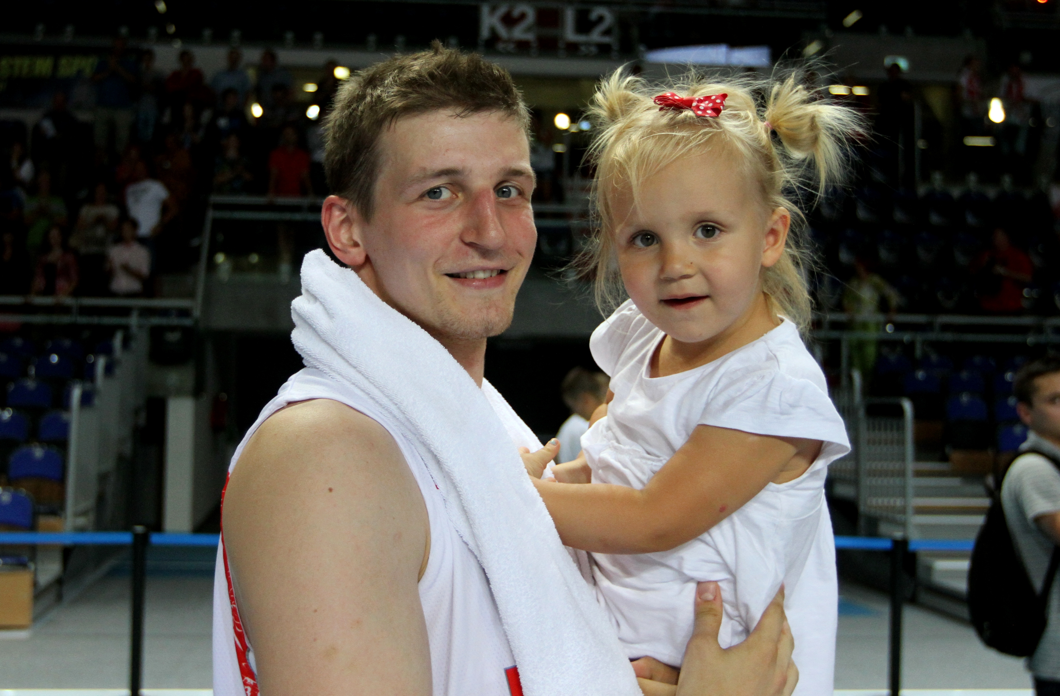 Toruń Basket Cup: Polska - Portugalia, 1 sierpnia 2014. Adam Waczyński z córką